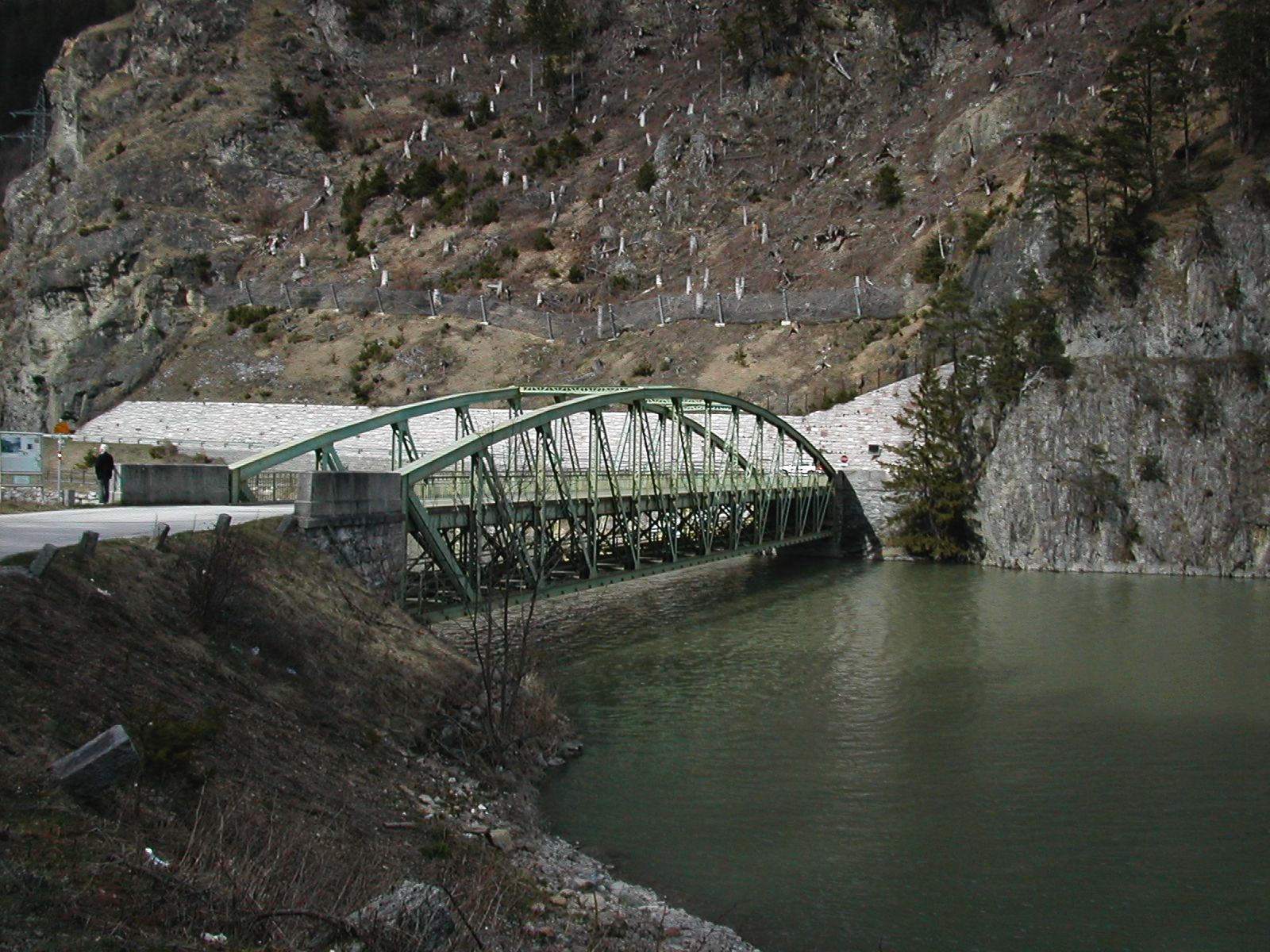 Pontlatzer Brücke bei Prutz im Tiroler "Oberen Gericht". Christoph Praxmarer.